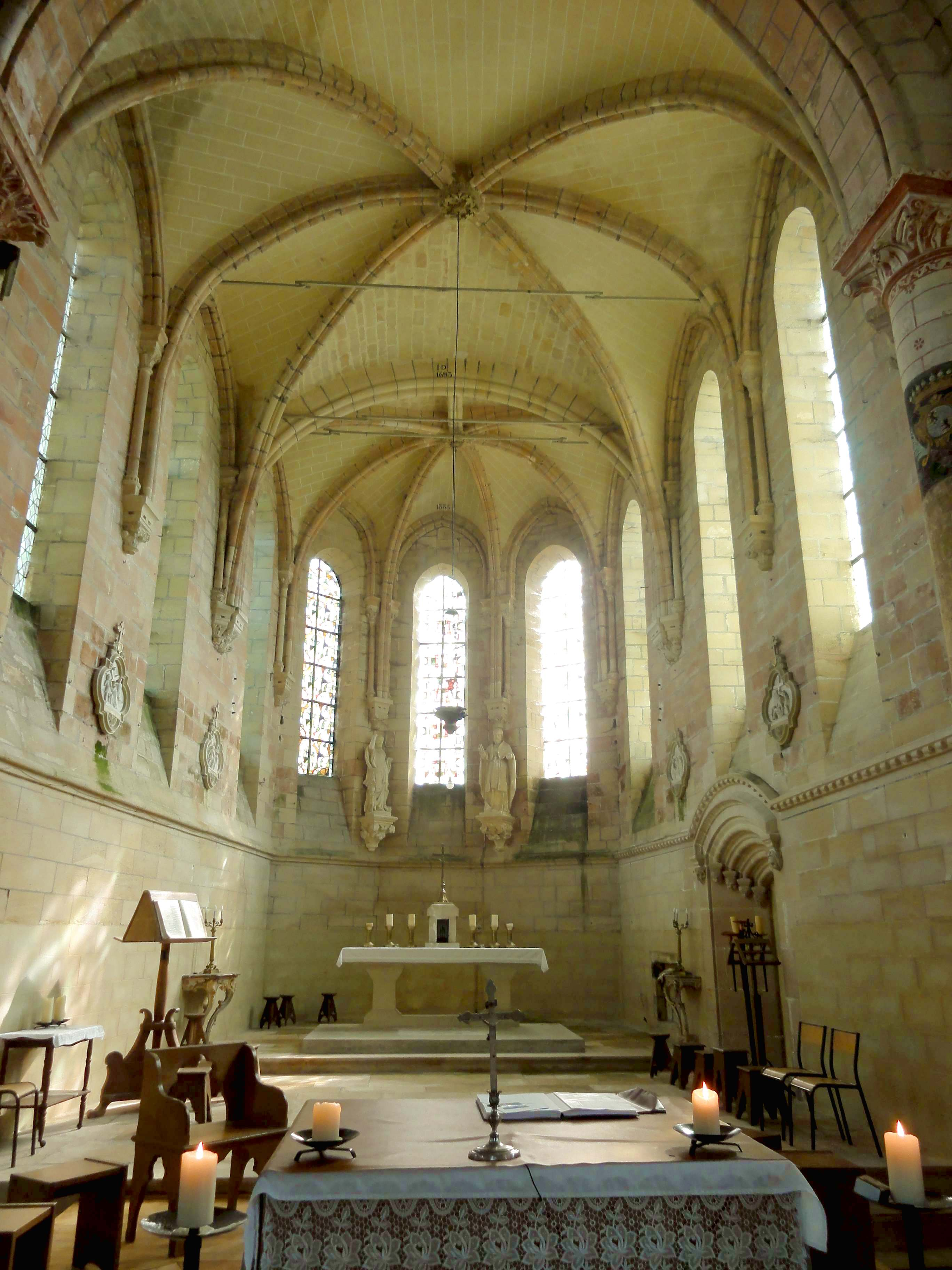 Intérieur de l'église (voir titre).